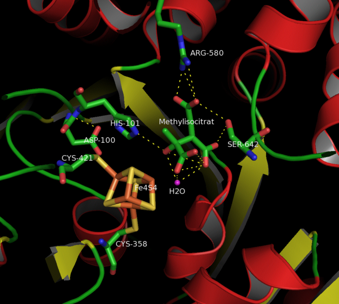 katalytisches Zentrum der Aconitase. Aconitase des Rinds; Abbildung erstellt aus pdb 1AMI ( mit pymol 0.99 ; neue Version.